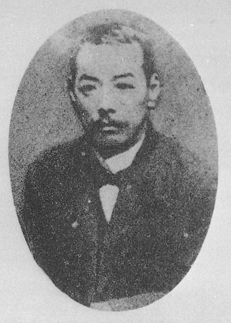 Portrait of Kawakami Otojiro (川上音二郎, 1864 – 1911)